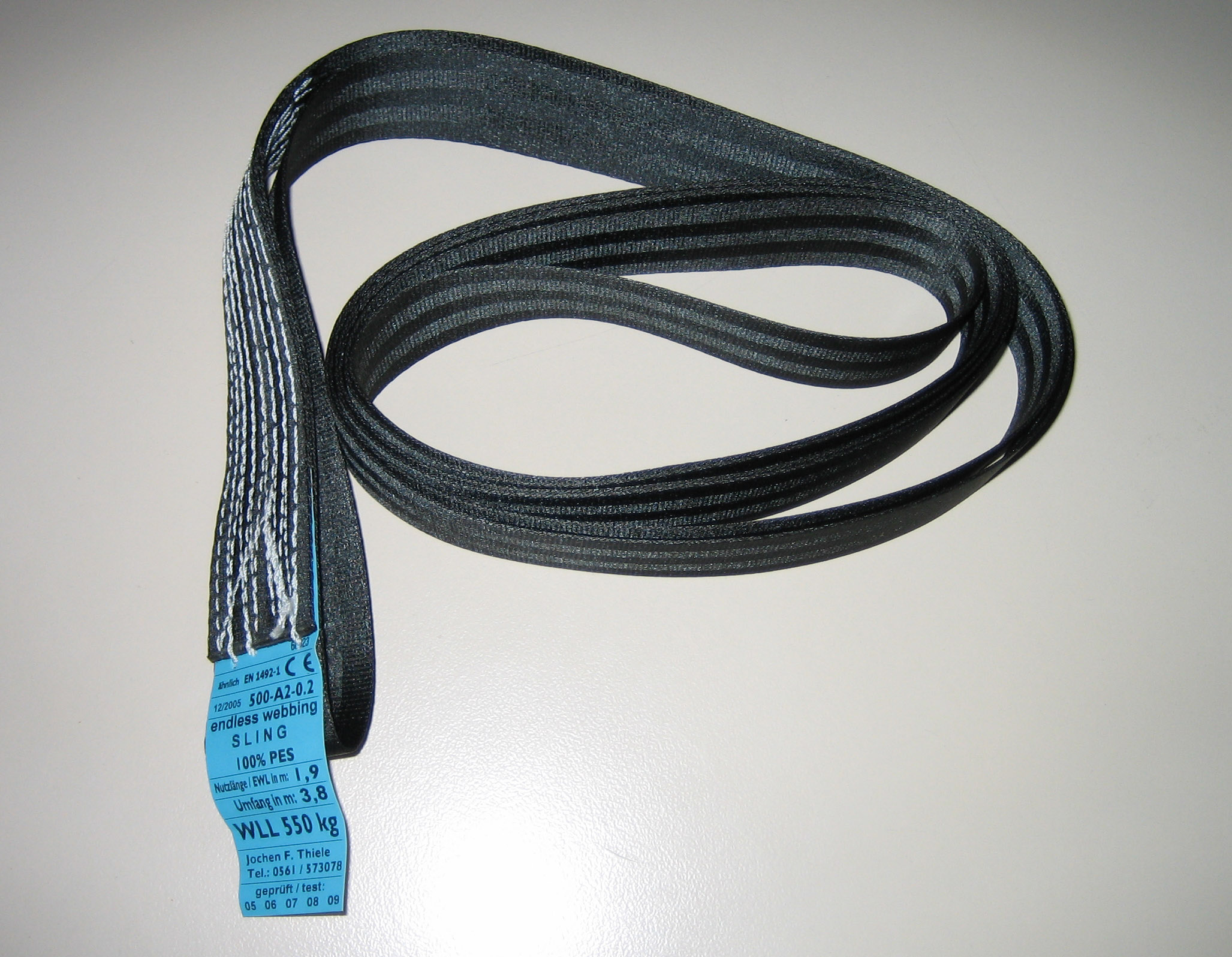 Rettungsschlinge bei der Feuerwehr